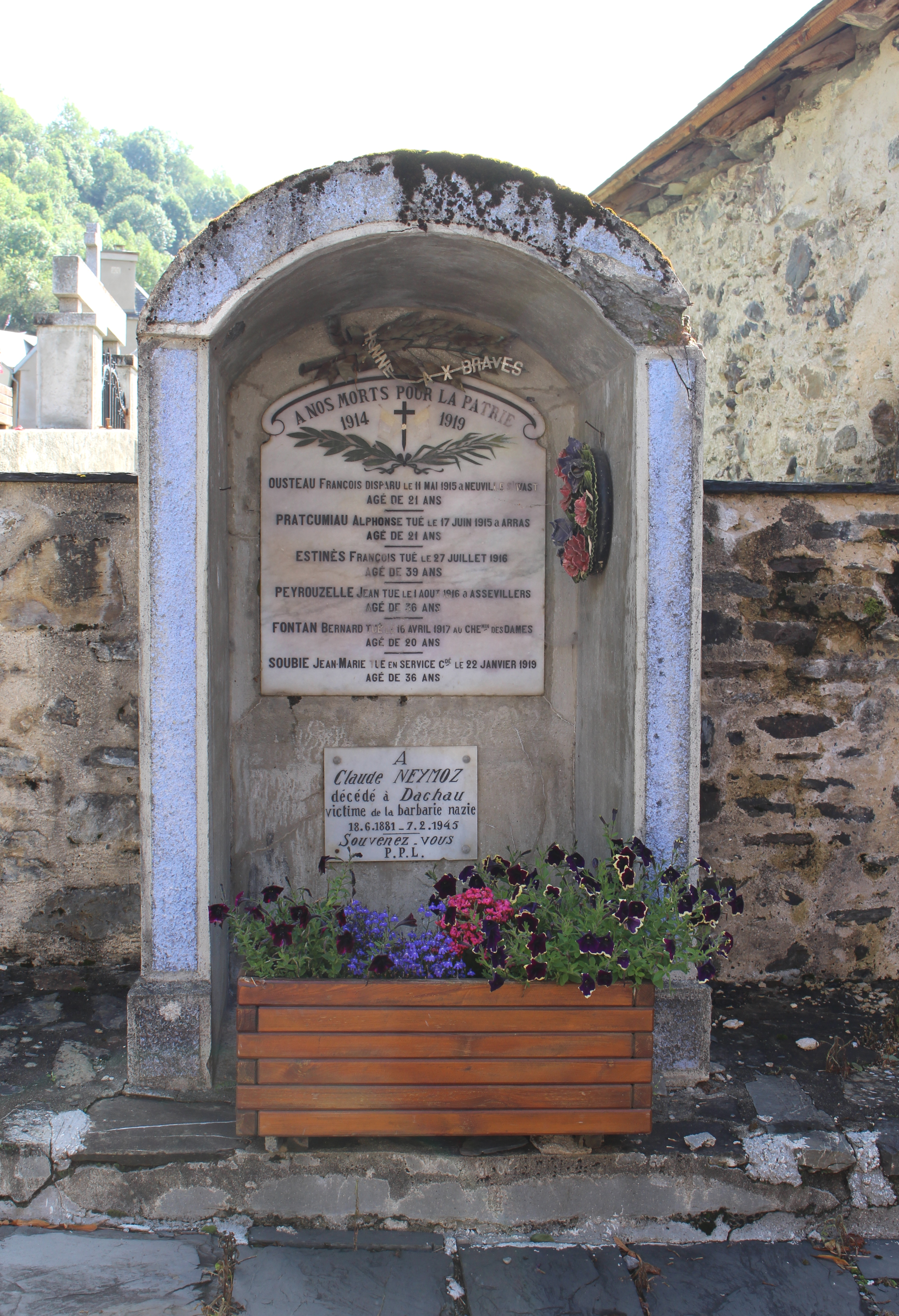 Monument aux morts de Germ (Hautes-Pyrénées)